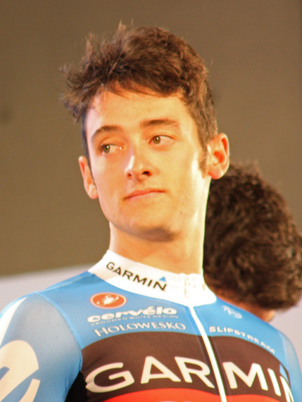 Utsunomiya 19/Oct/2012